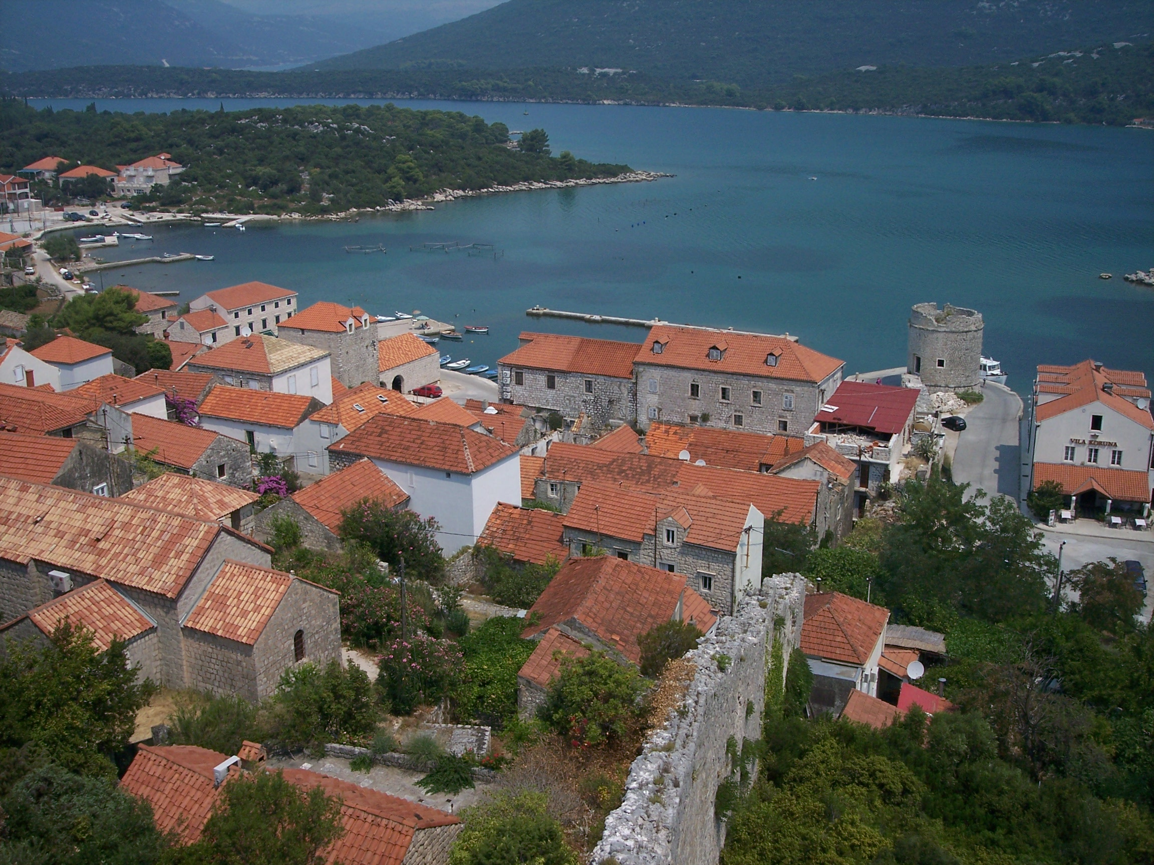 Mali Ston (Croatia)